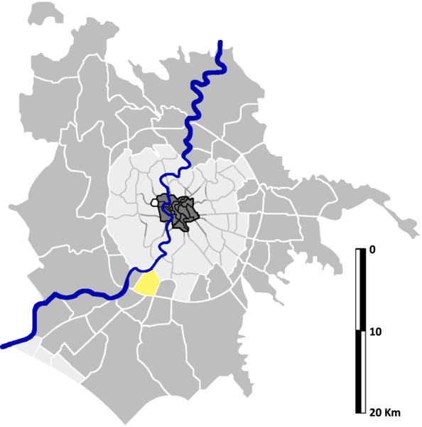 Torrino